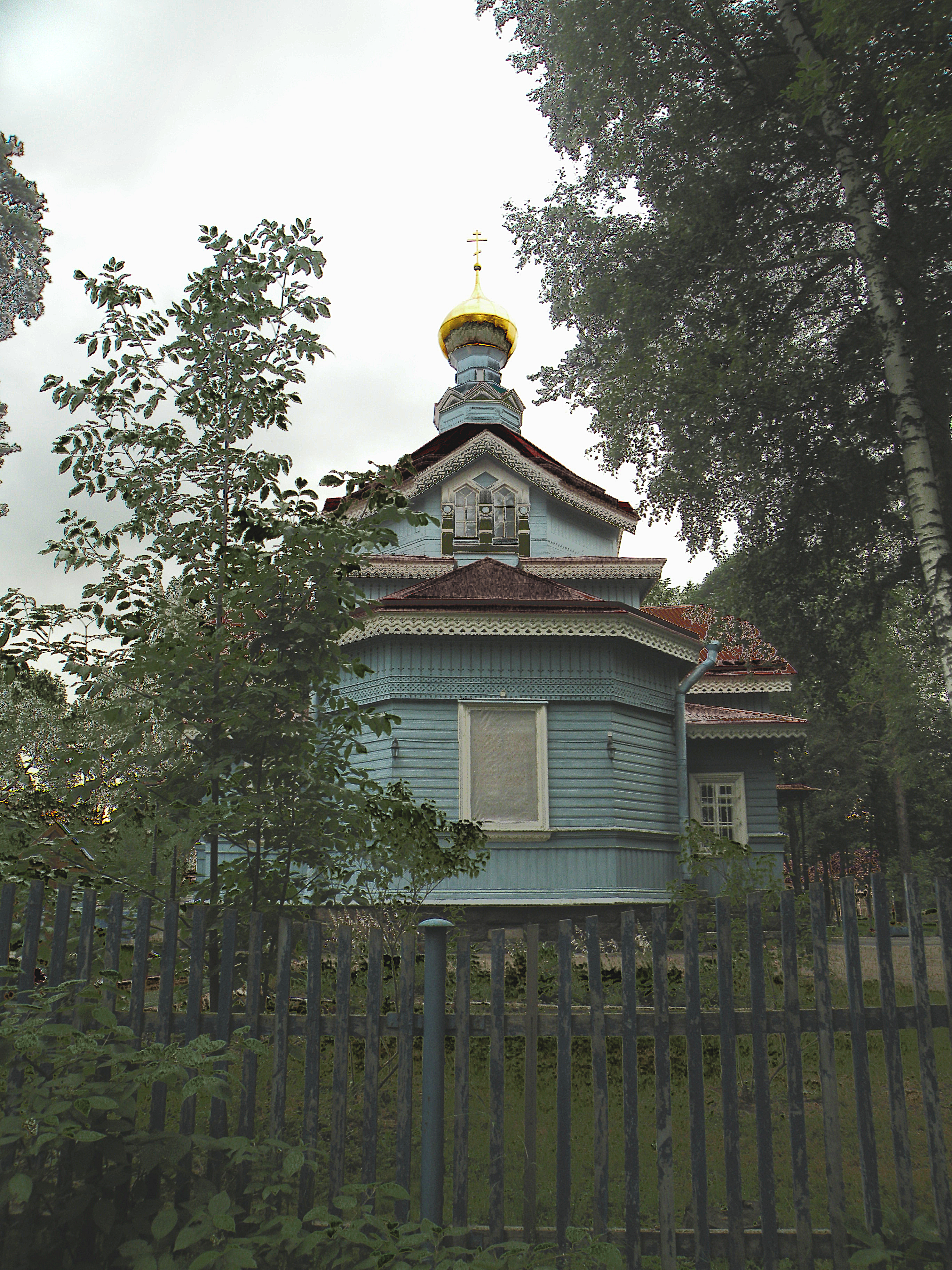 Церковь в Лахте.